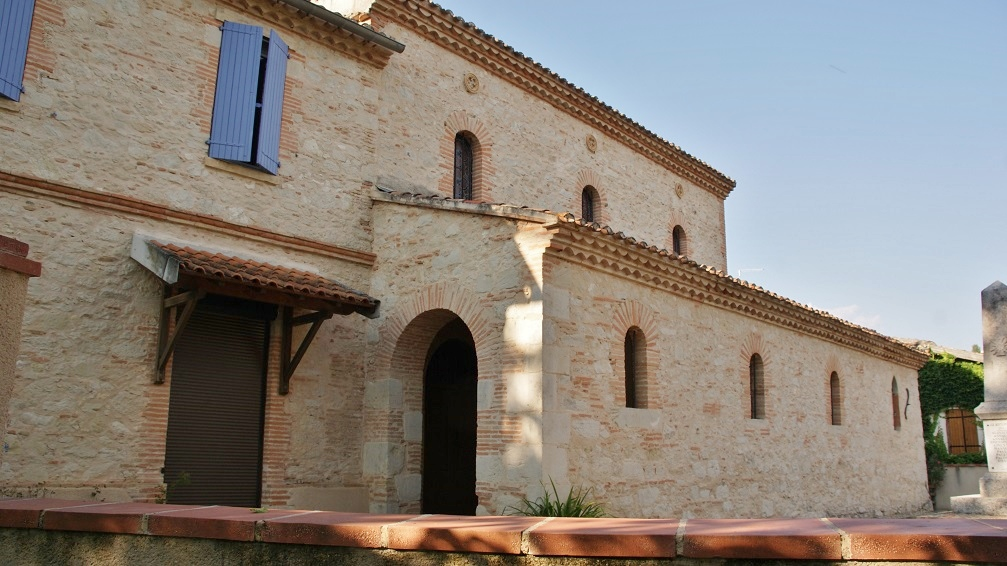 église saint Barthelemy